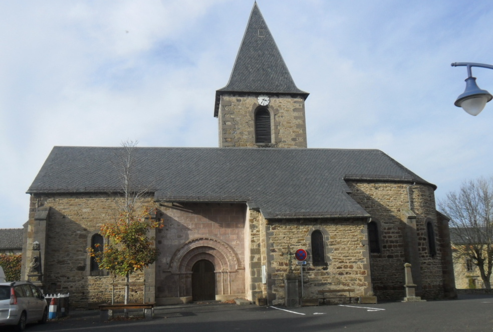 Église catholique de la commune de Vieillespesse dans le Cantal.